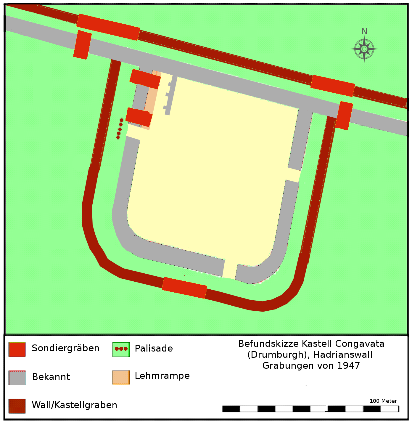 Befundplan des Kastell Congavata (Hadrianswall), Drumburgh (GB), Befunde von 1947.